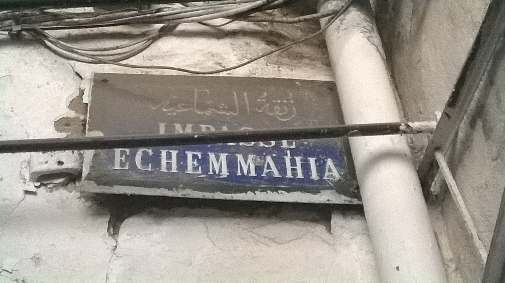 La médina de Tunis مدينة تونس العتيقة